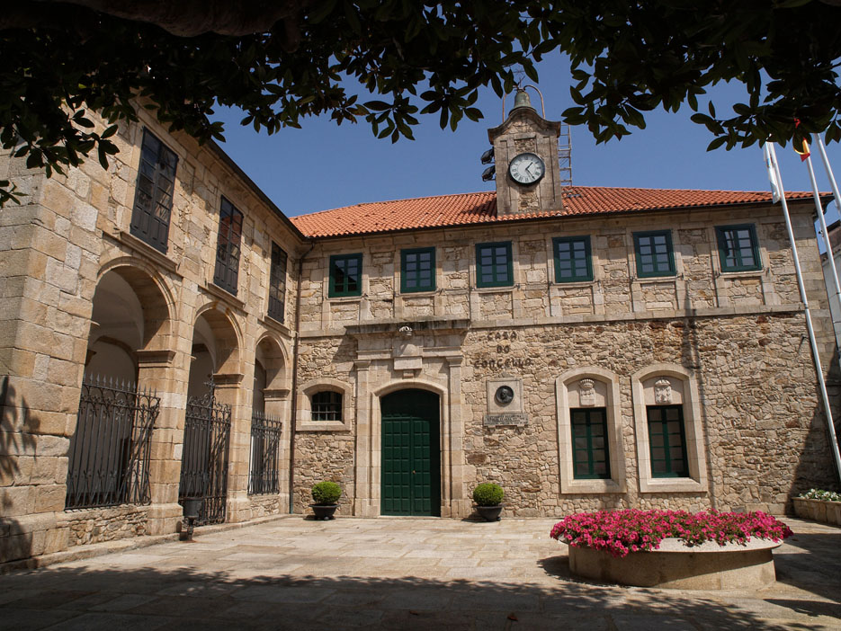 Concello de Ortigueira